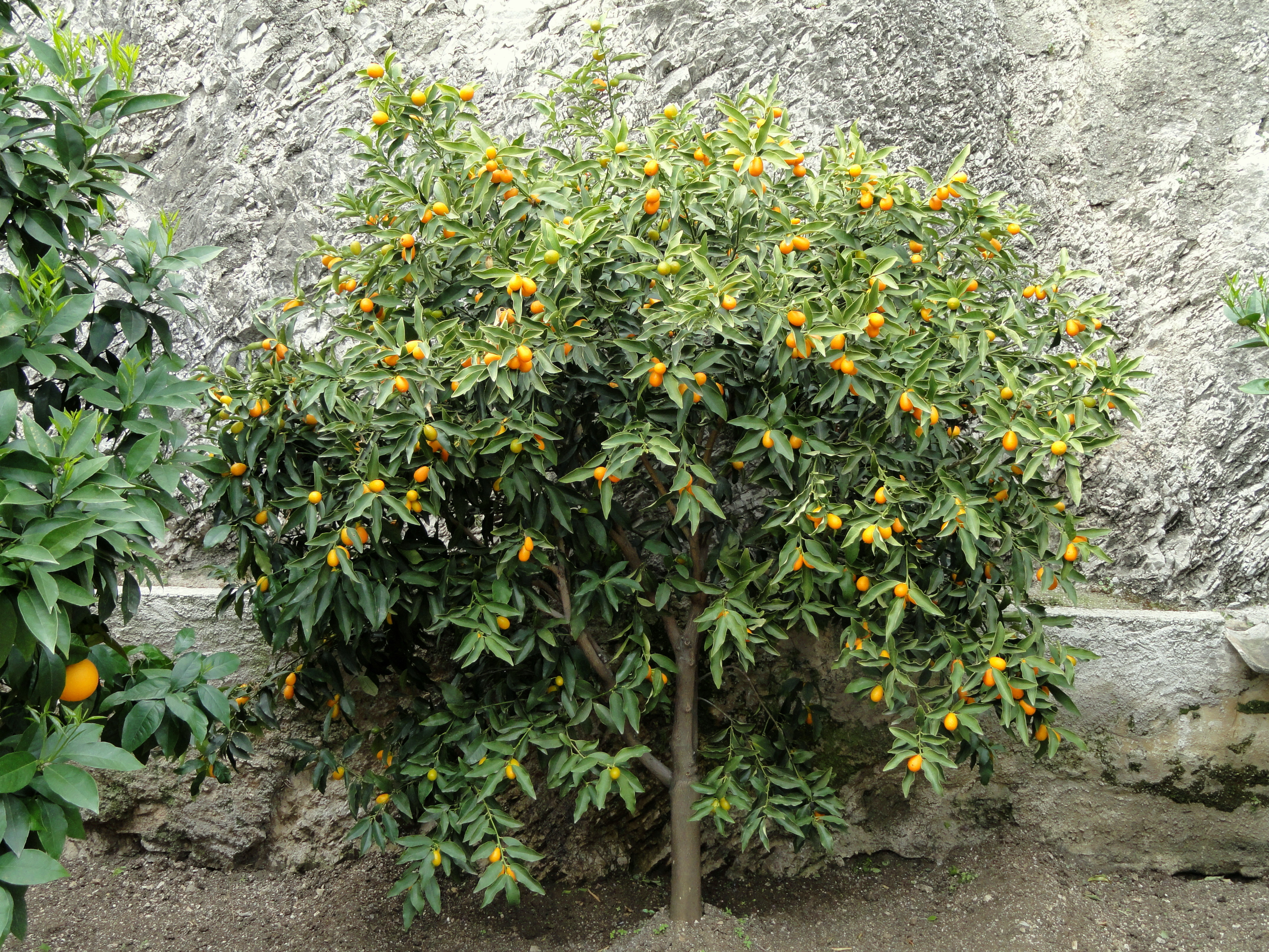 Fortunella japonica in the Limonaia del Castel, Limone sul Garda, on Lake Garda, Brescia, Italy.